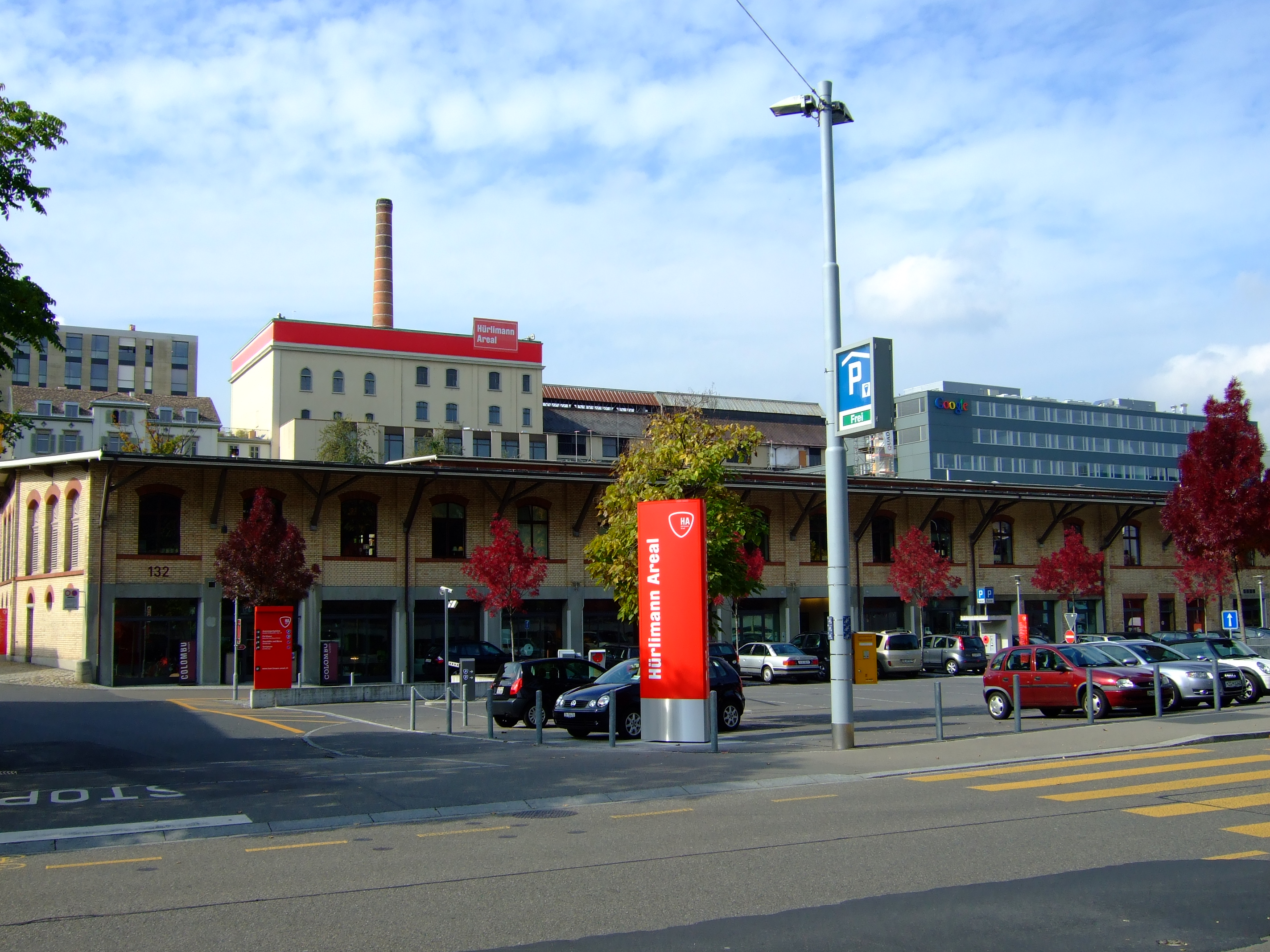 Das Areal der ehemaligen Brauerei Hürlimann 2008